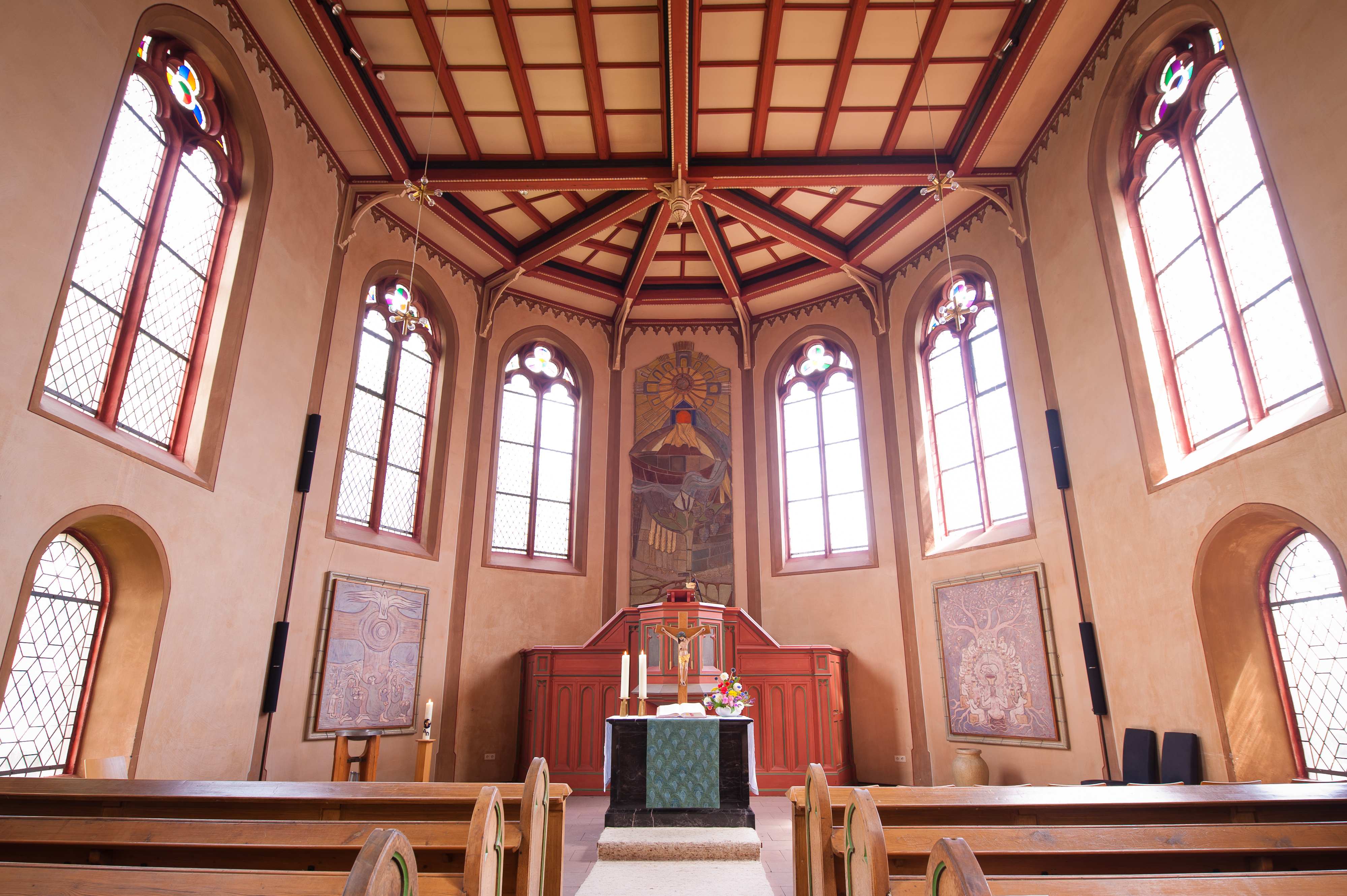 Evangelische Kirche Kinzenbach, Landkreis in Hessen, Deutschland